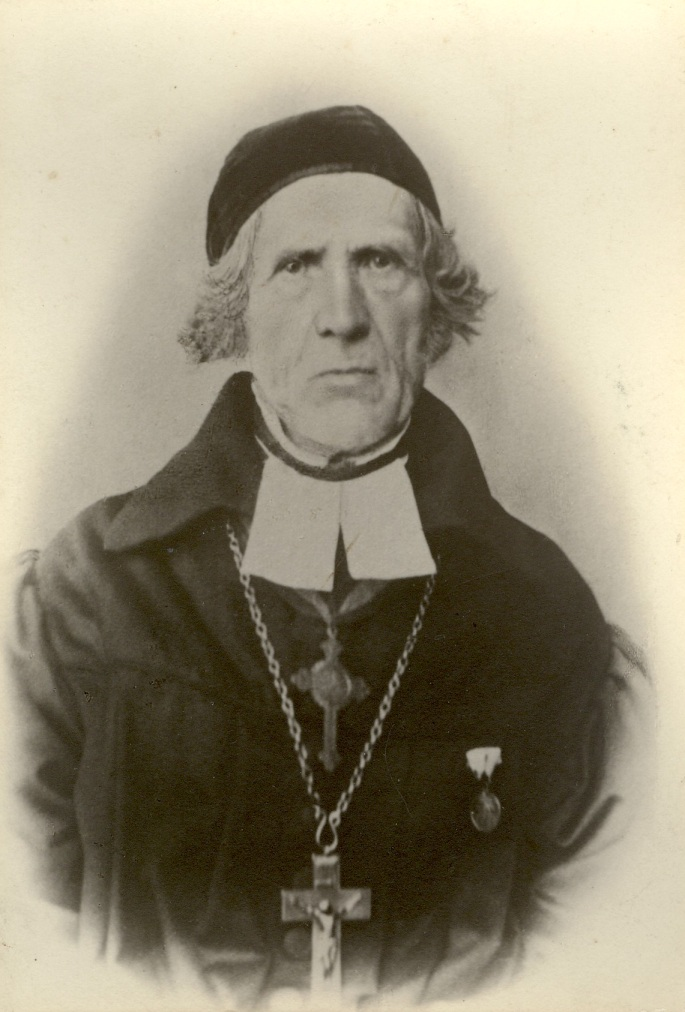 Eestimaa vaimulik Carl Gotthard Hammerbeck (1800-1870)